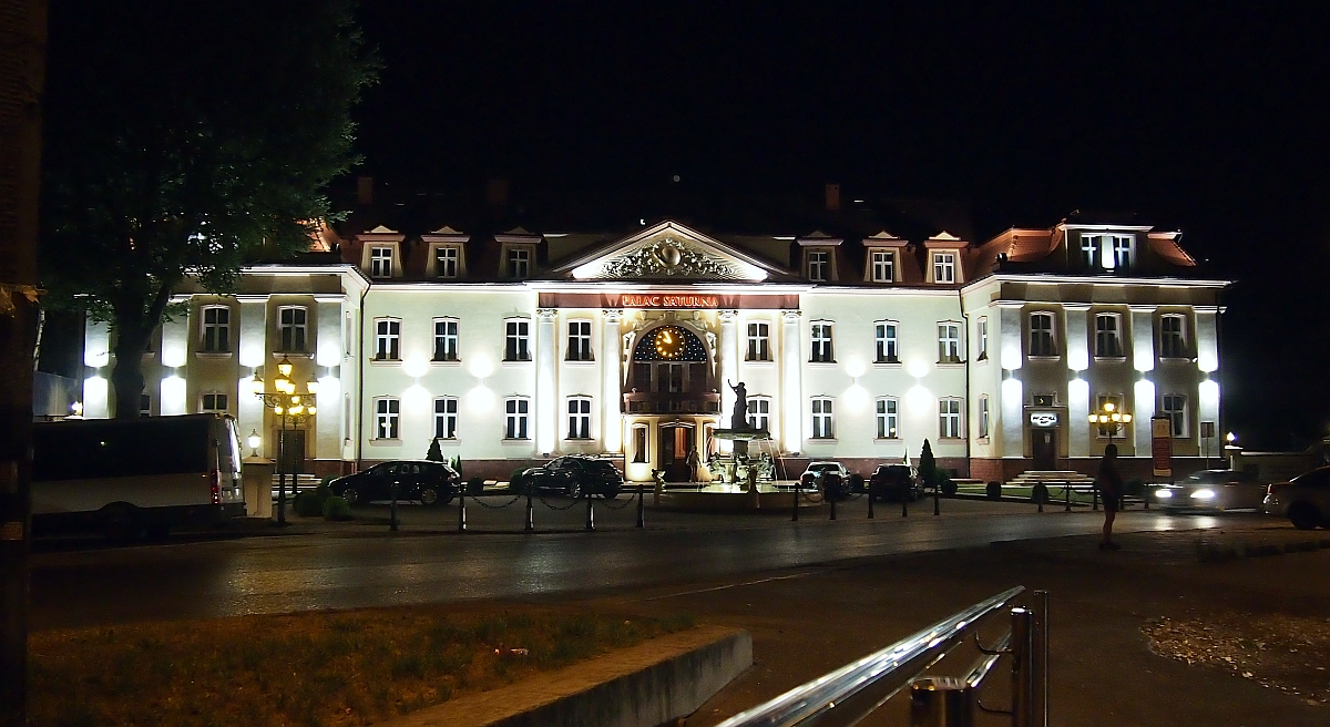 Pałac Saturna w Czeladzi przy ulicy Dehnelów 2.